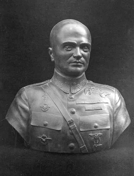 Franciszek Żwirko, popiersie wykonane przez Michała Kamieńskiego.